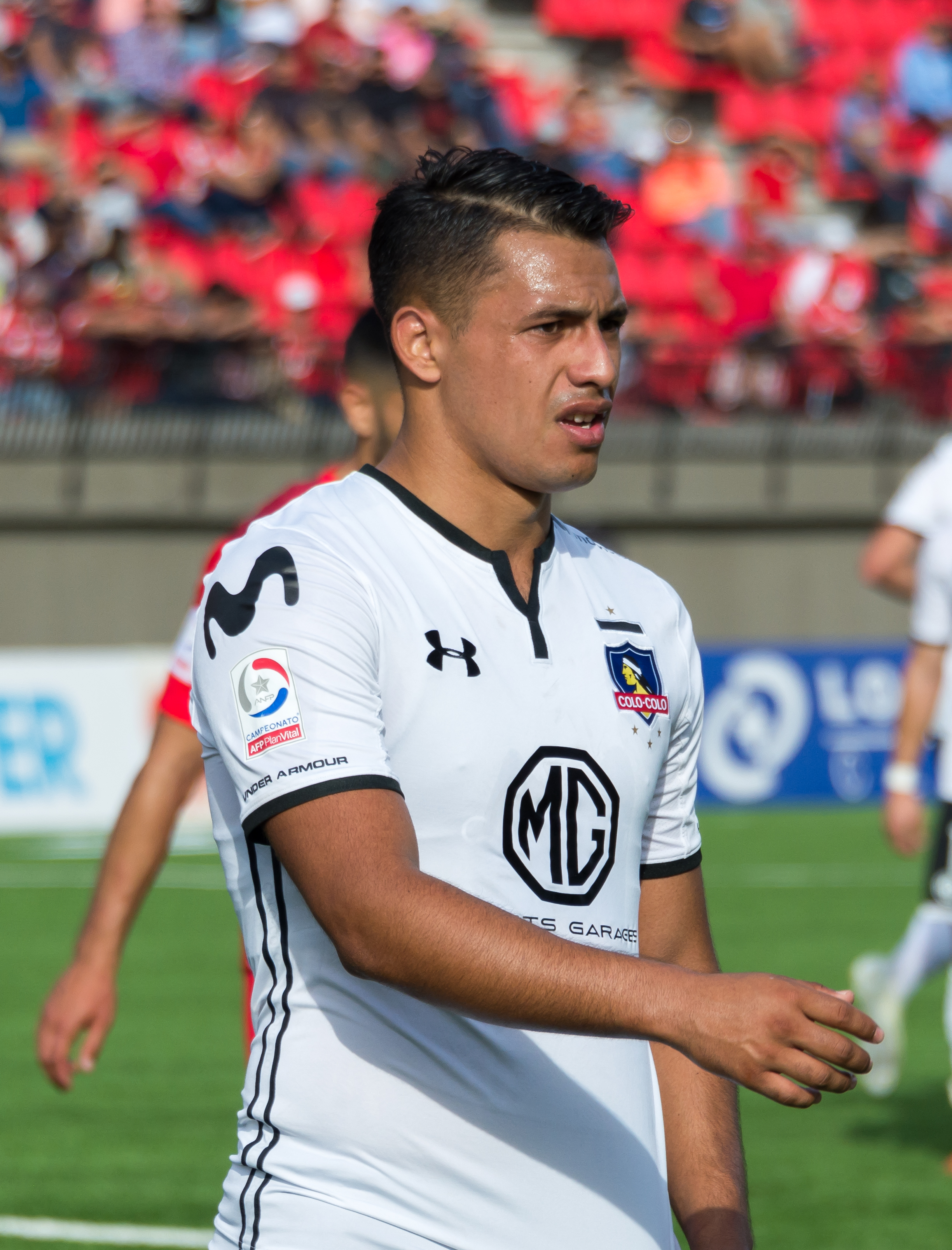 Iván Morales, Unión La Calera v Colo-Colo, Estadio Municipal Nicolás Chahúan Nazar, La Calera, Región de Valparaíso, Chile.